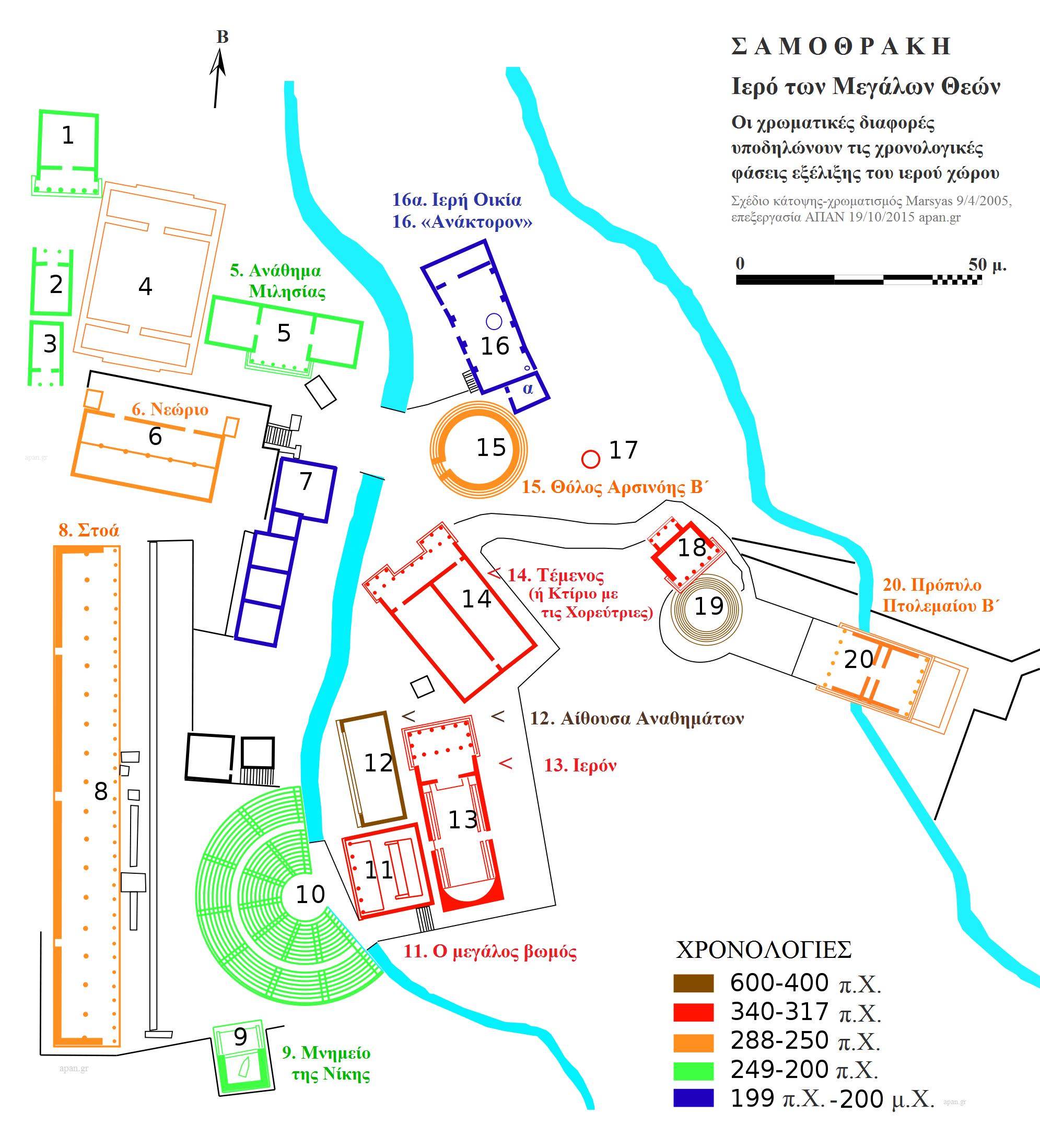 Το Ιερό των Μεγάλων Θεών στη Σαμοθράκη. Κάτοψη του χώρου. Επεξήγηση: 1–3: Ελληνιστικά κτίσματα 4: 5: Ανάθημα Μιλησίας 6: Νεώριο 7: 8: Στοά 9: Μνημείο της Νίκης της Σαμοθράκης 10: Θέατρο11: Μεγάλος Βωμός 12: Κτήριο έκθεσης των αναθημάτων 13: Ιερόν 14: Κτήριο με τις χορεύτριες / Τέμενος 15: Η ροτόντα της Αρσινόης / Αρσινόειον 16: Ανάκτορον 17–19: 20: Προπύλαια του Πτολεμαίου / Πτολεμαίον